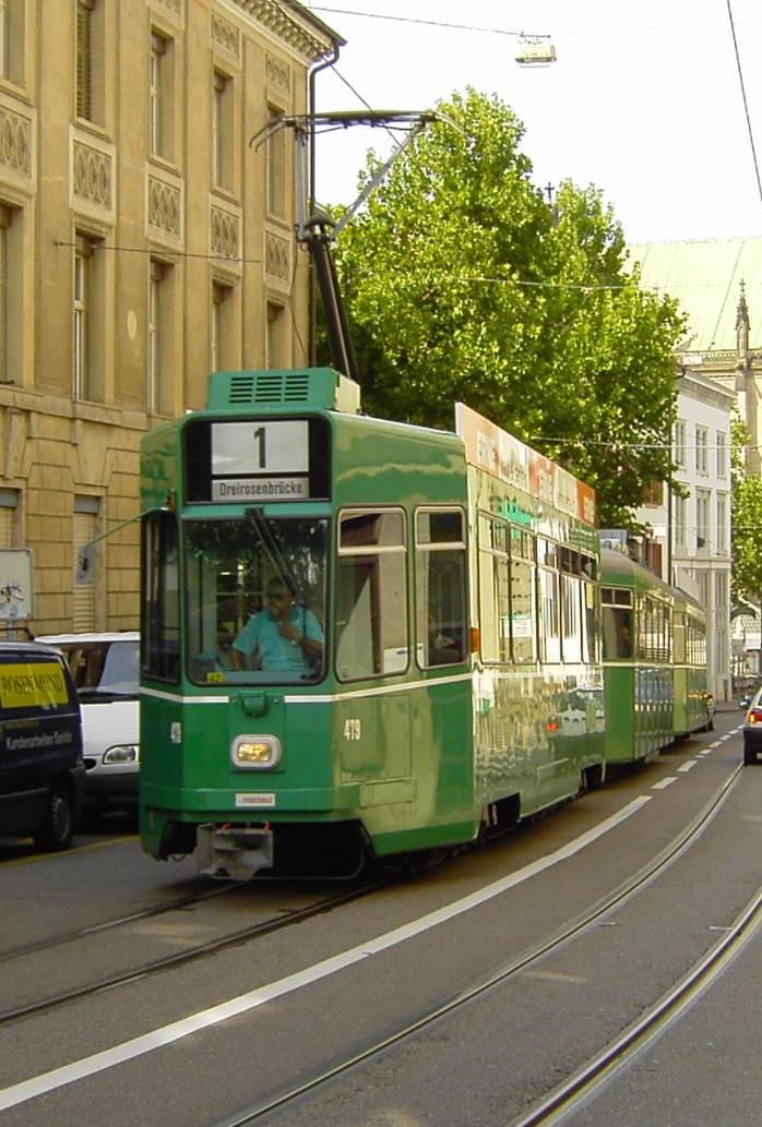 Beschreibung: Straßenbahn der Basler Verkehrs-Betriebe Quelle: selbst aufgenommen Fotograf: CrazyD, 16. Aufgust 2005 Lizenzstatus: GNU FDL Description: tram of the Basler Verkehrs-Betriebe Source: photo was taken by my self Photographer: CrazyD, 16 August 2005 Licence: GNU FDL